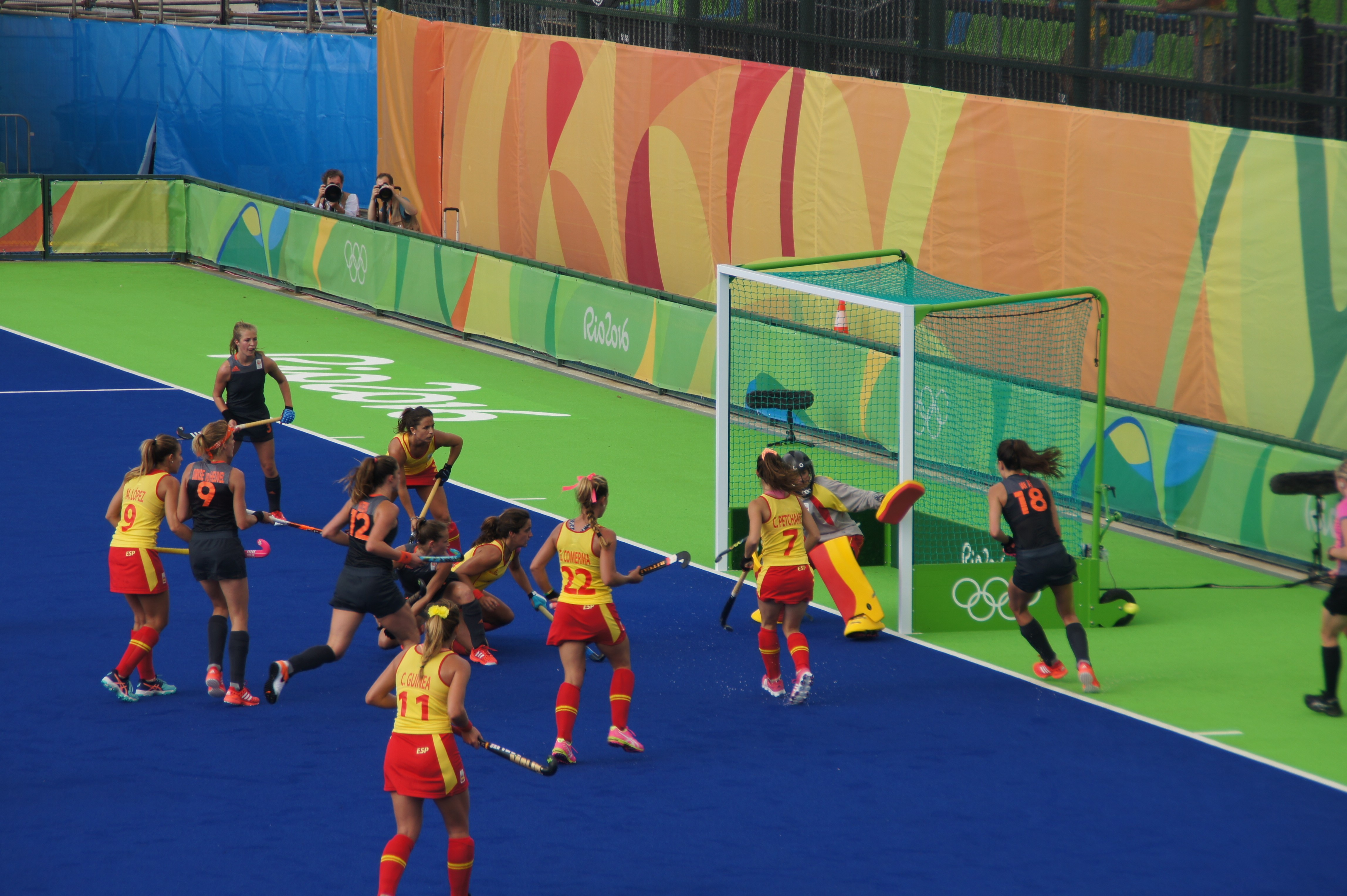 Rio 2016.Hóquei na grama. Feminino. Holanda x Espanha. 62